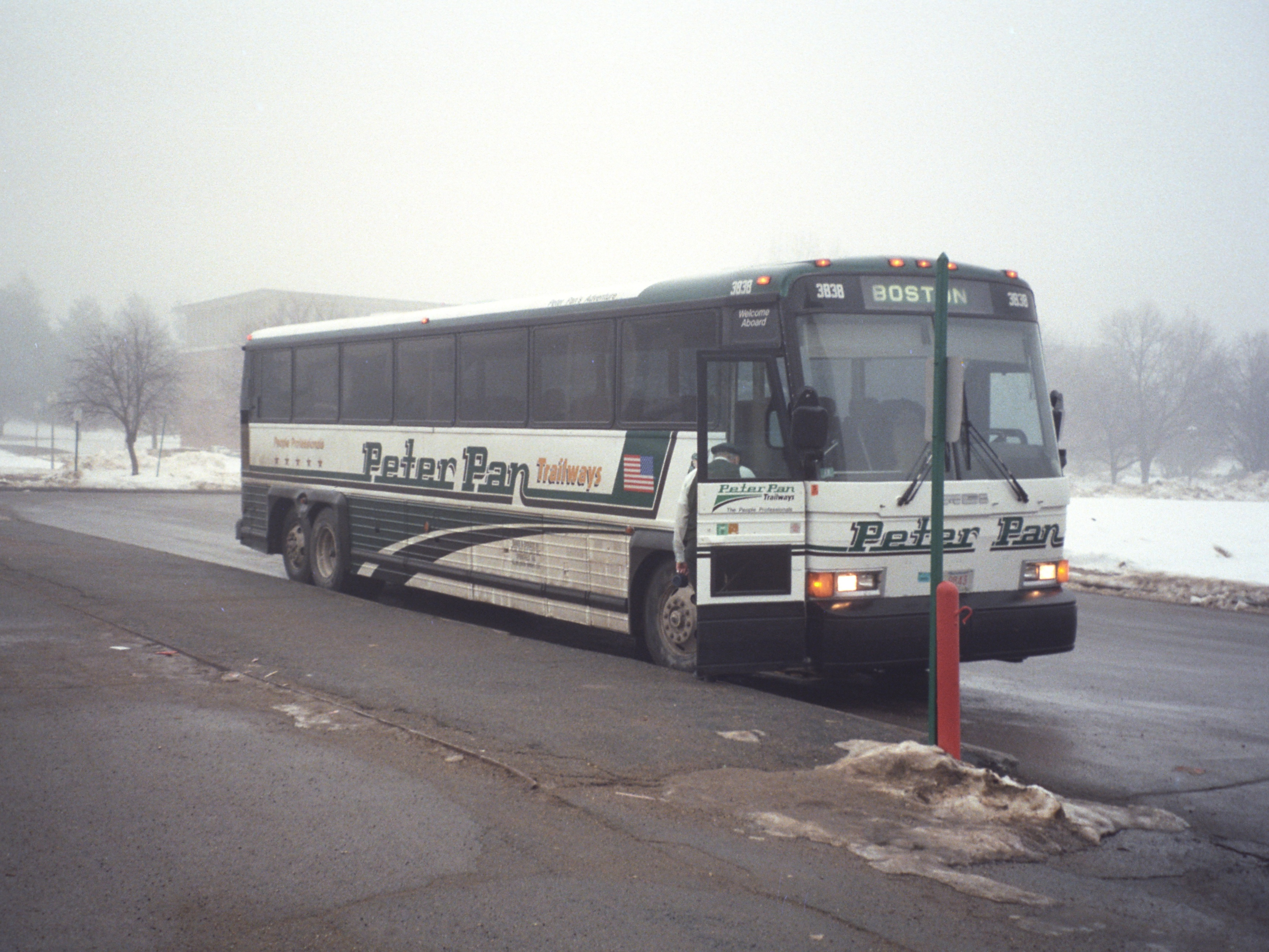 Bus Peter Pan Massachusetts USA